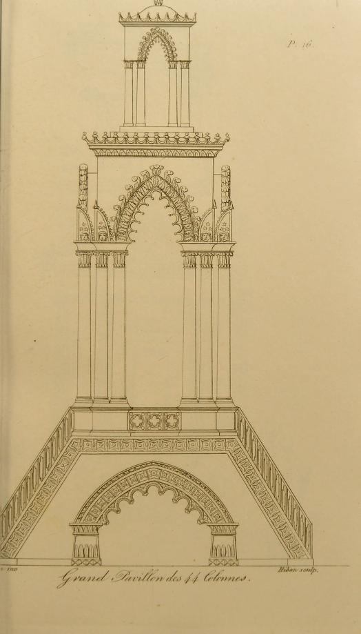 安東南‧卡漢姆的「裝置」藝術蛋糕設計圖樣